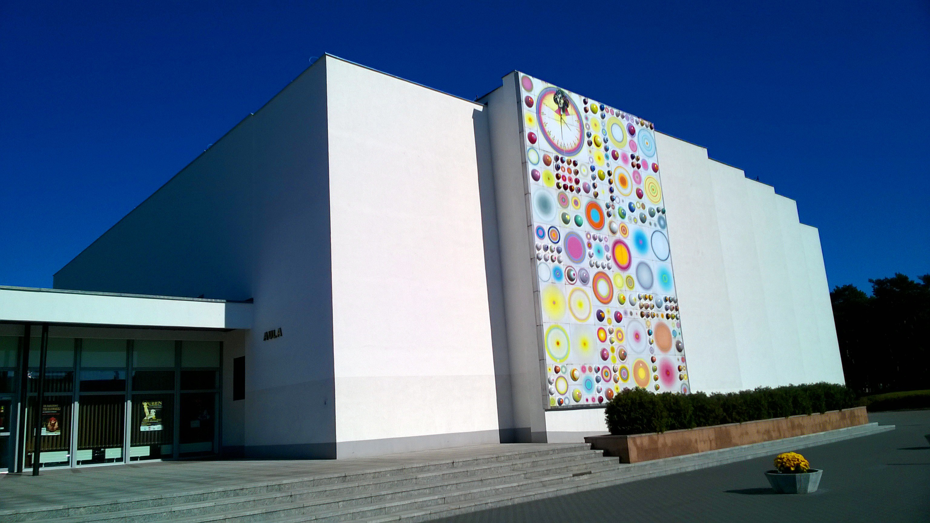 Aula UMK w Toruniu44